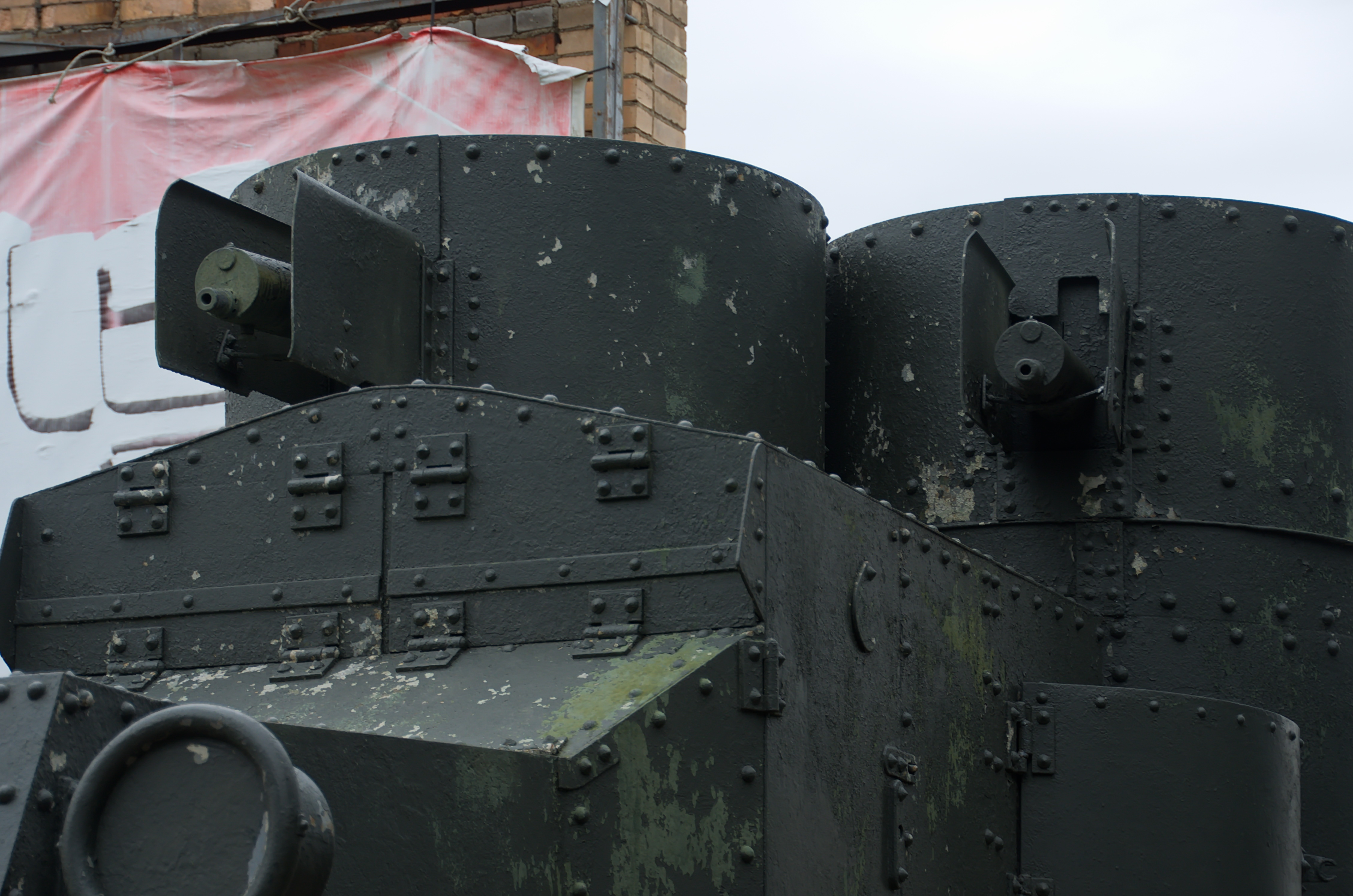 0489 - Moskau 2015 - Panzermuseum Kubinka